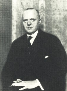 Porträt des Dichters Rudolf Alexander Schröder.